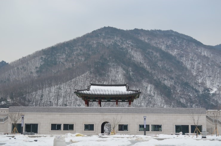 (신)구랑리역사